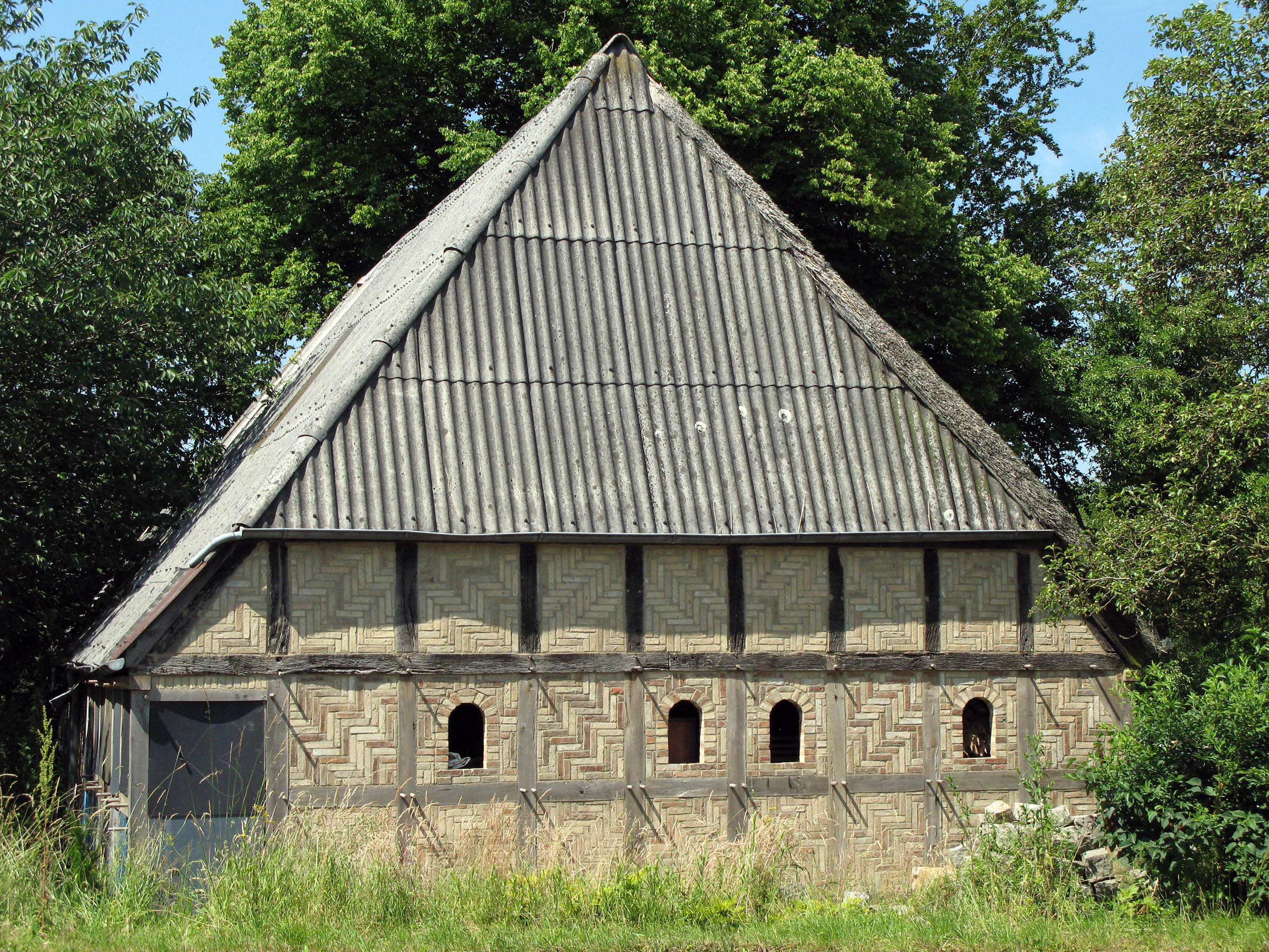 Süderbrarupholm, Giebelansicht des Bauernhauses Holm 52